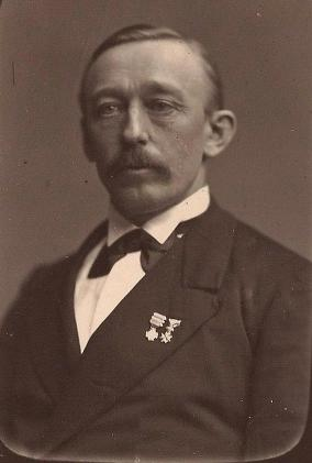 Anske Hielke Kuipers (1833 - 1902), vervaardigd in Haarlem ca. 1880, maker onbekend, Beeldbank Menno Simons. Gezaghebber (kapitein) van het schip Boni van de Nederlands-Indische Gouvernementsmarine. Doopsgezind bestuurder.